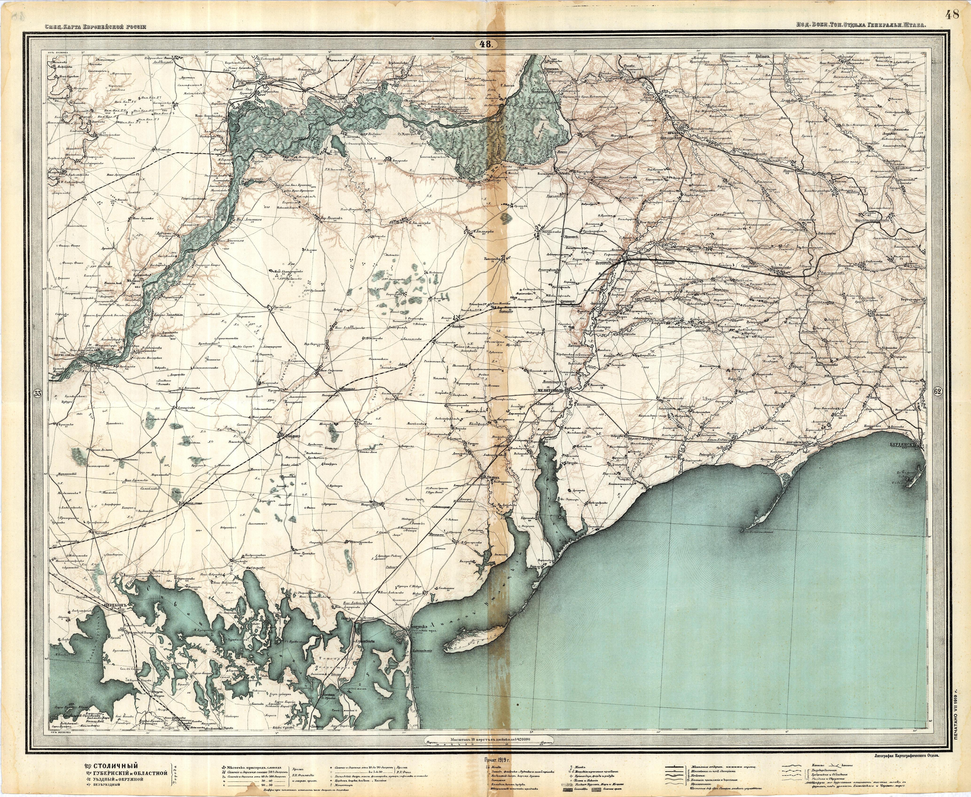 Лист 48 Специальной карты Европейской России. Масштаб - 10 вёрст в дюйме (в 1 см 4,2 км) Автор - Стрельбицкий, Иван Афанасьевич